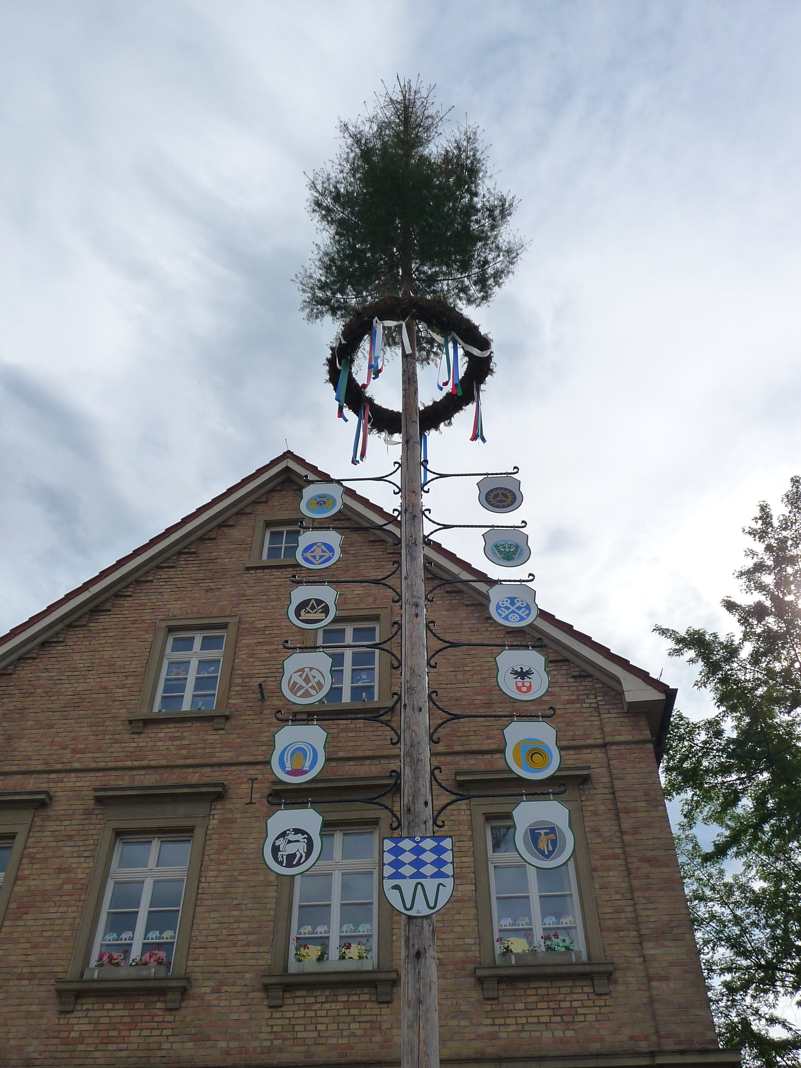 Zunftbaum mit geschmückten Maibaum in Oftersheim (Rhein-Neckar-Kreis, Deutschland), aufgestellt auf dem Platz vor dem Rathaus, im Hintergrund der 1888 erbaute spätklassizistische Klinkerbau der Friedrich-Ebert-Grundschule